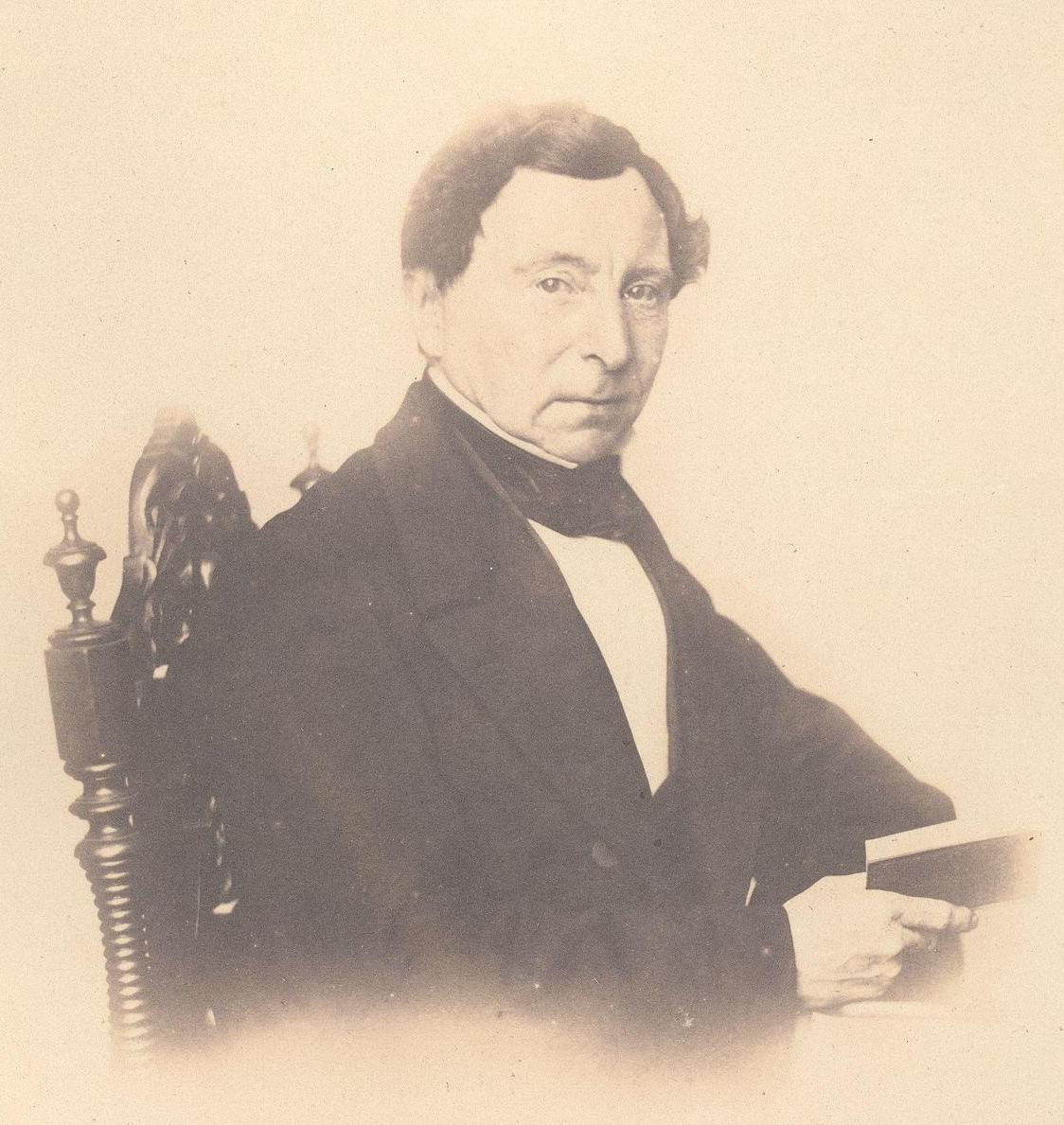 Jan Gerhardus Ottema (1804-1879)